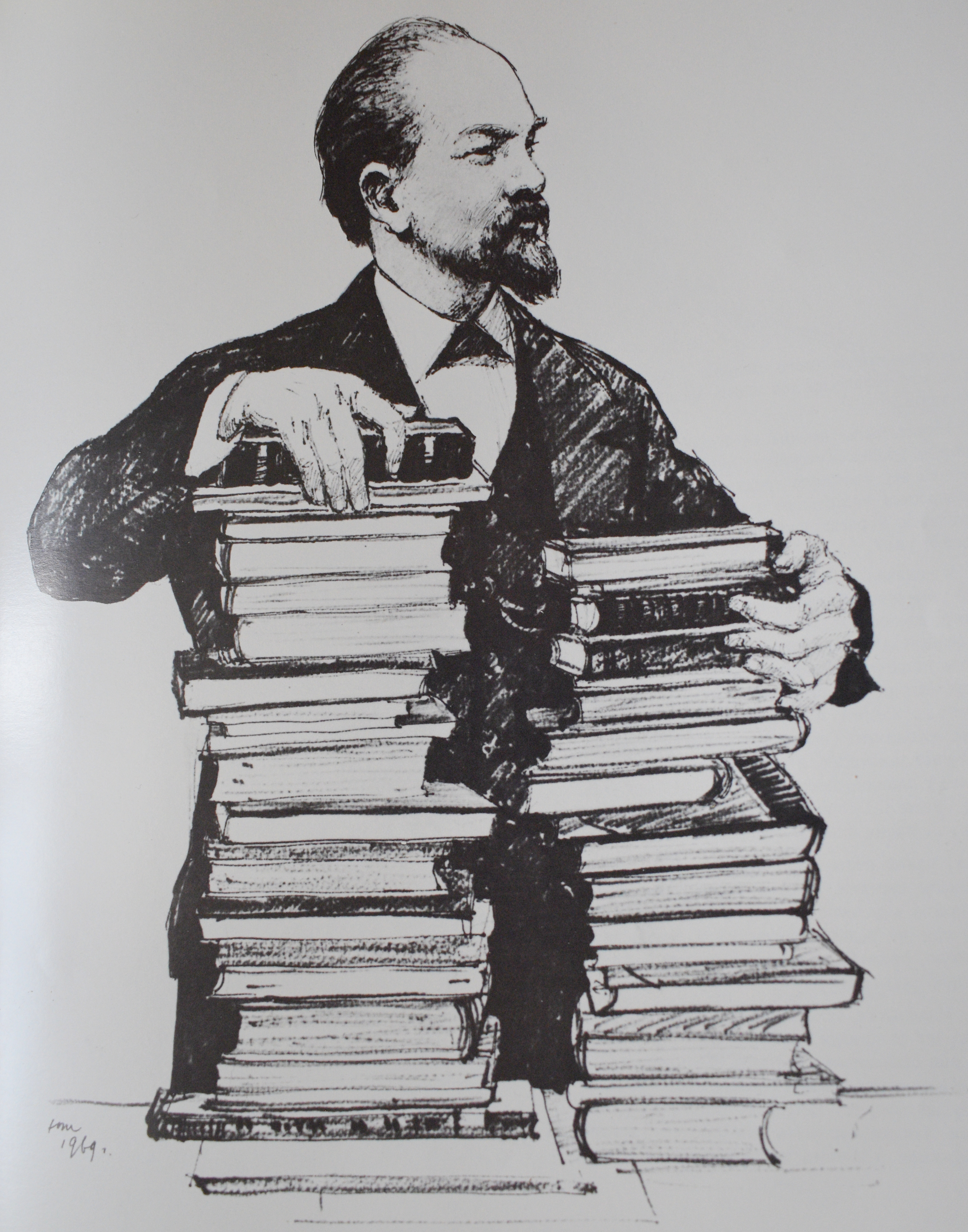 Владимир Илич Ленин - „Пред нови трудове" Худ.Николай Жуков